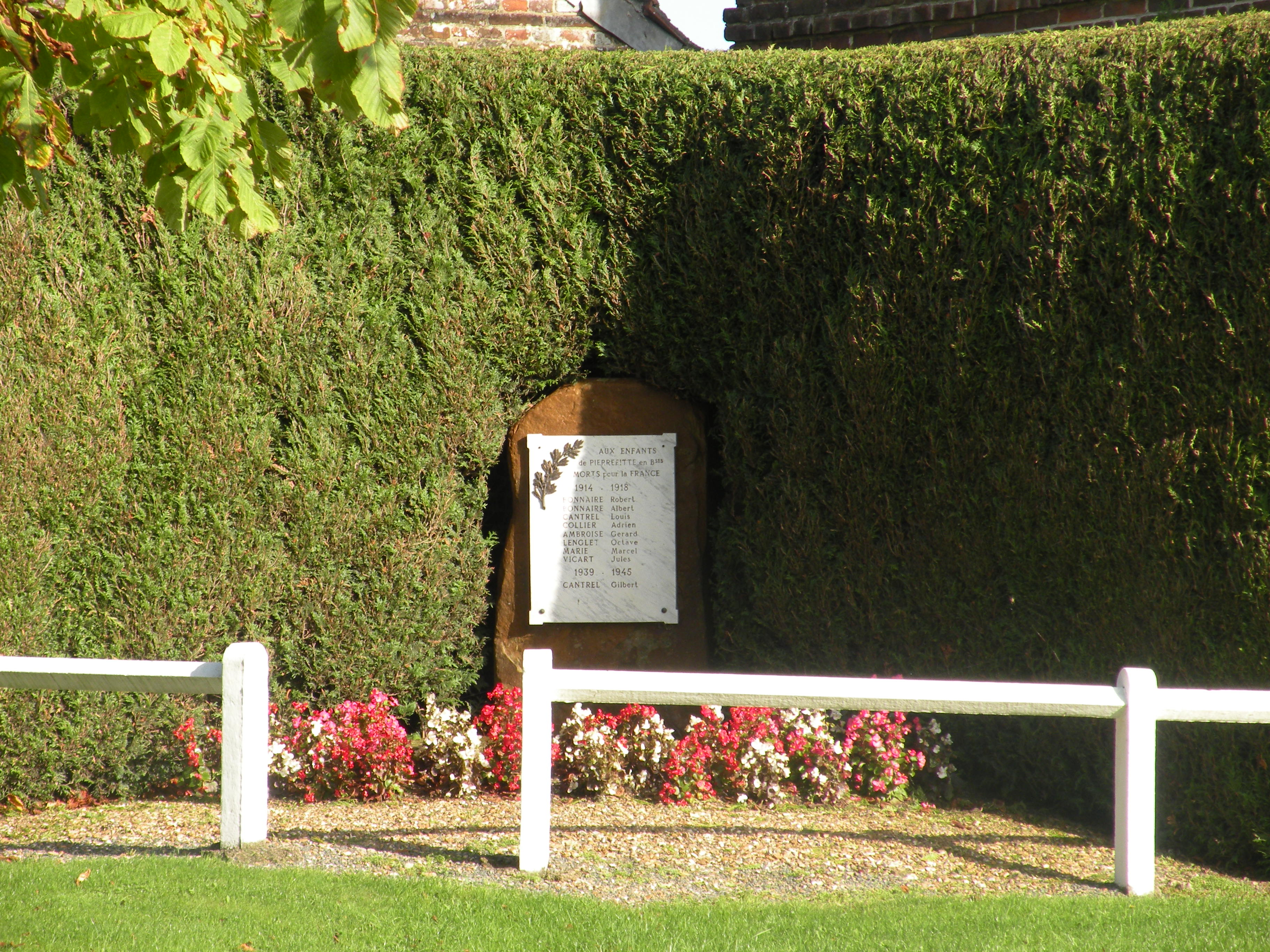 monument aux morts Pierrefitte-en-Beauvaisis